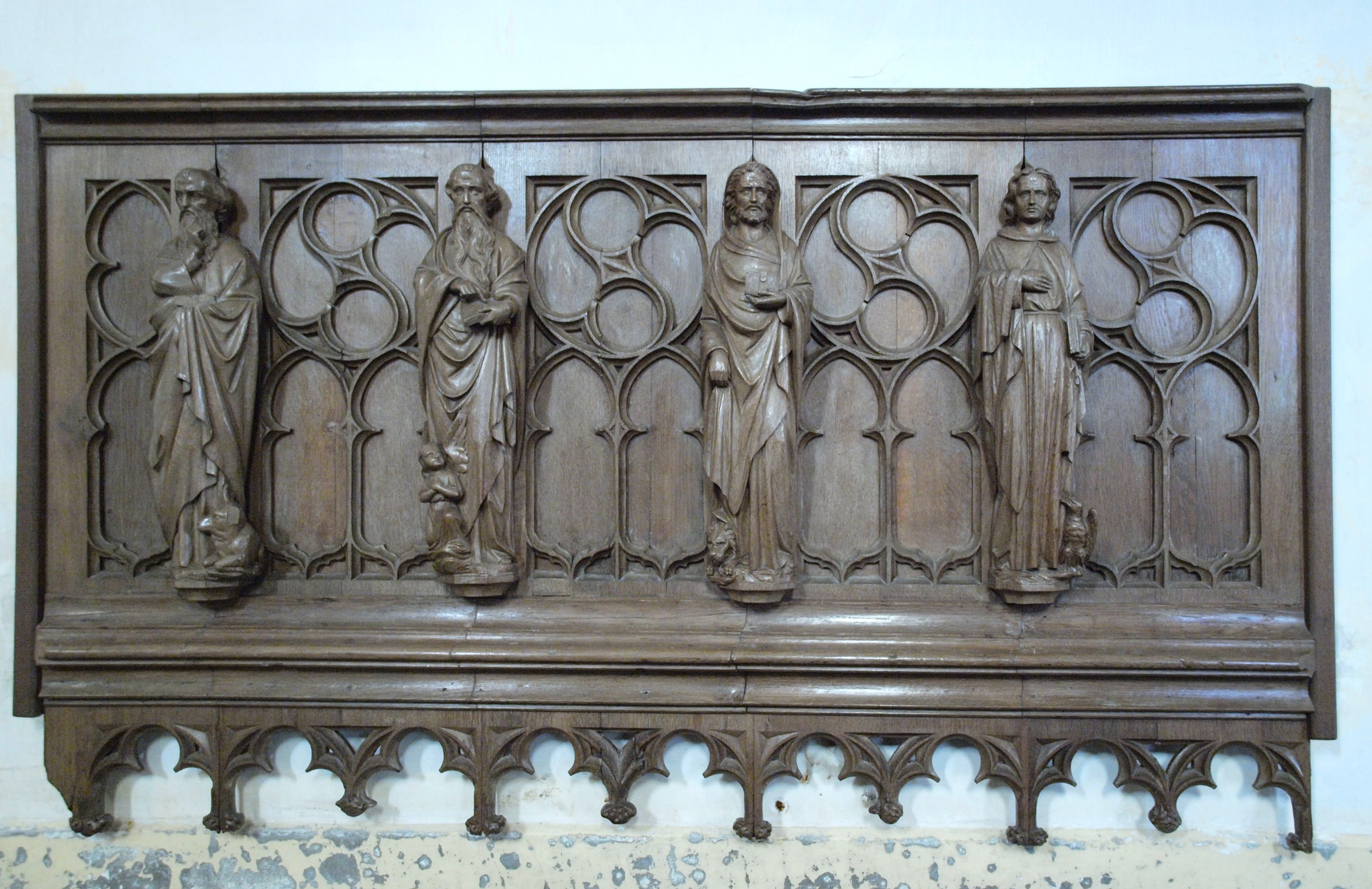 Église Saint-Pierre et Saint-Paul de Semide (Ardennes, France) ; retable en bois du XVIe siècle, qui représente les quatre évangélistes.